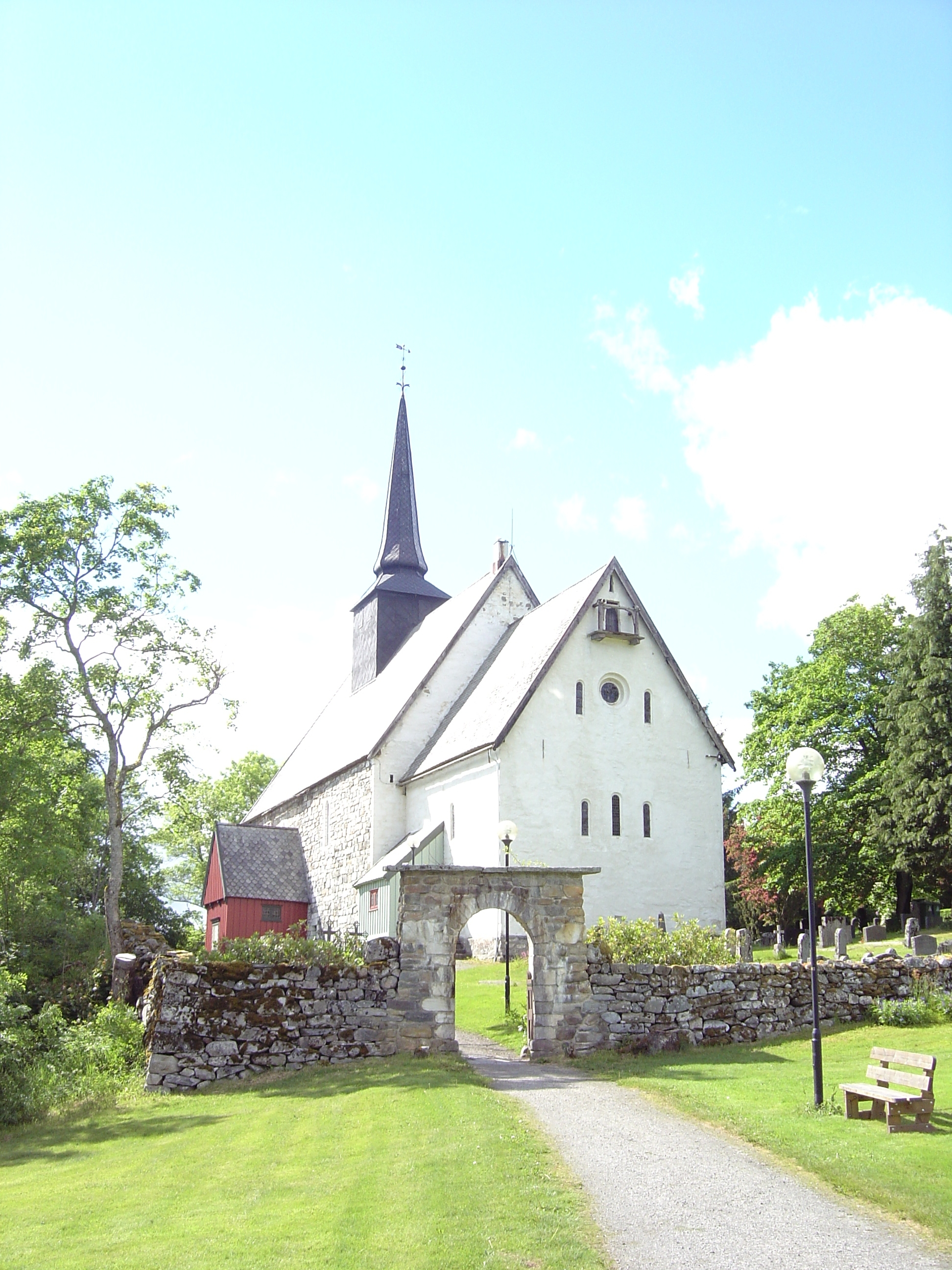 Tingvoll kirke